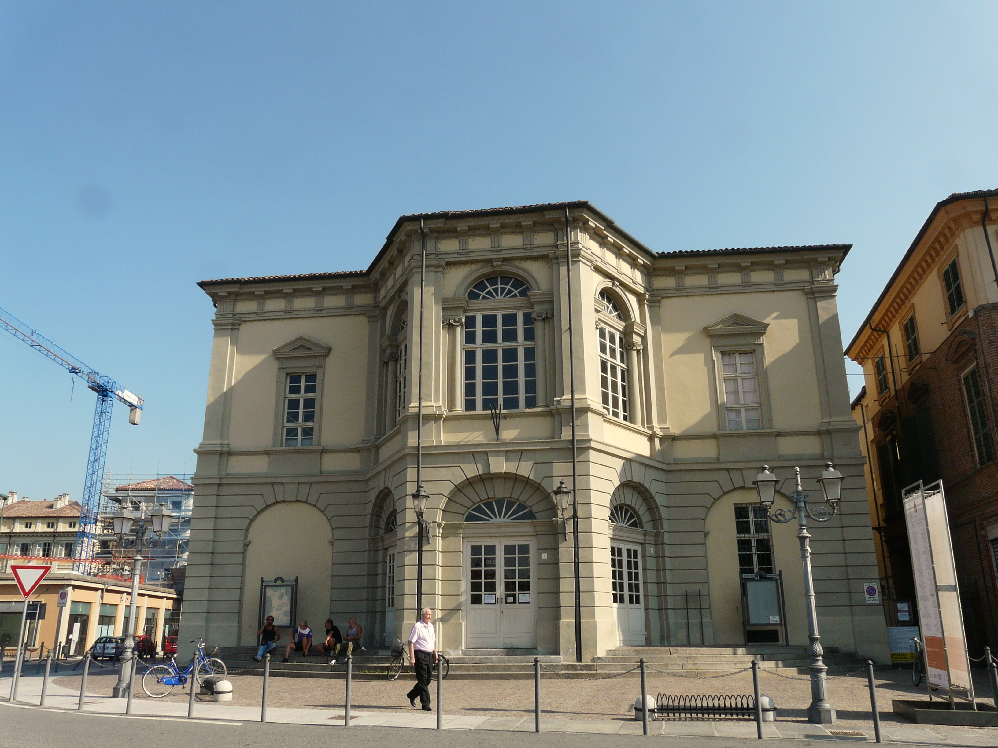 Teatro Civico, Casale Monferrato, Piemonte, Italia